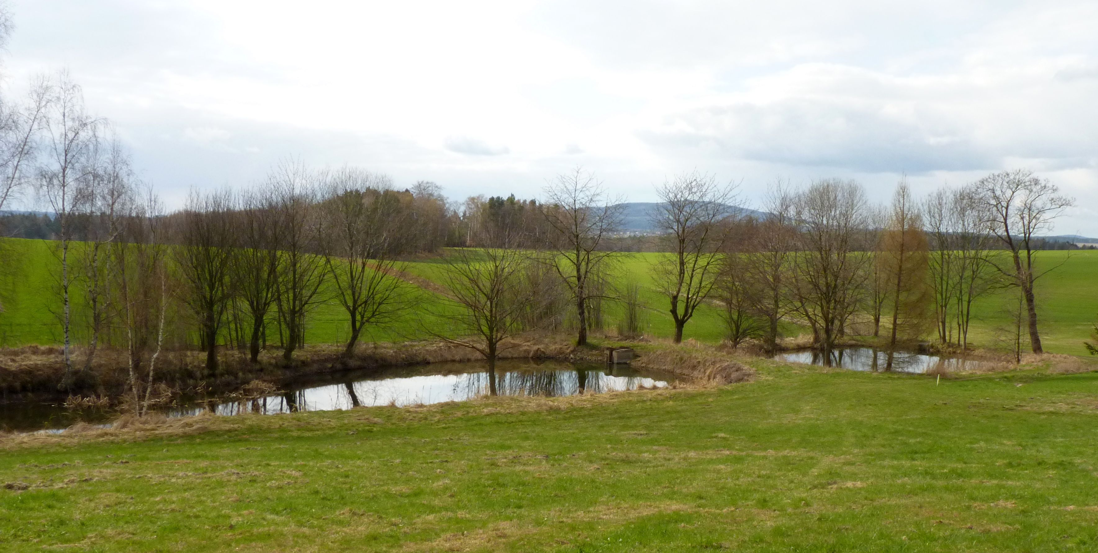 Fischteiche am Oberlauf des Dreibörnerbachs am Köningsholz in der Oberlausitz.